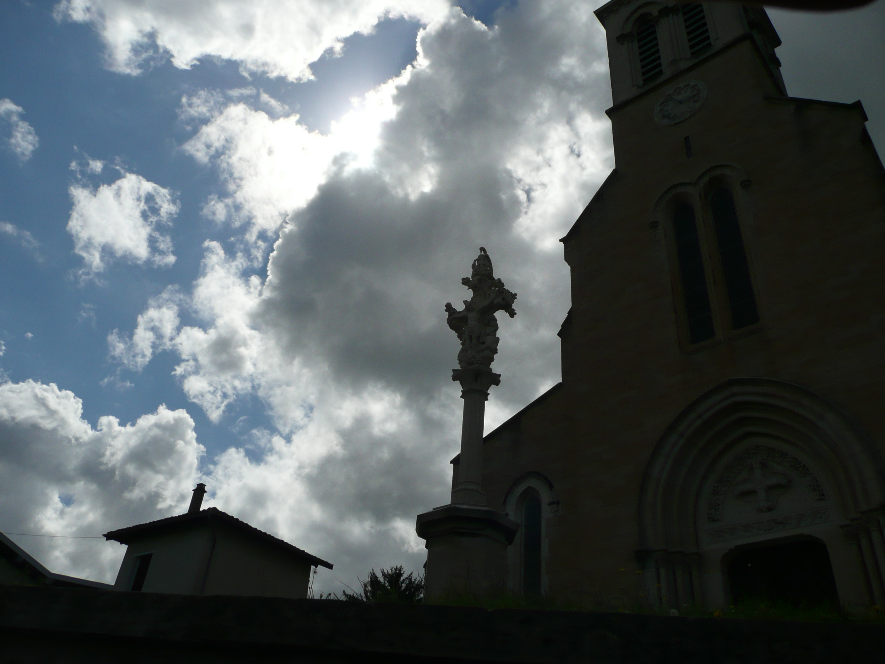 Calvaire (inscrit aux monuments historiques) et église de Mogneneins (France) en silhouette.